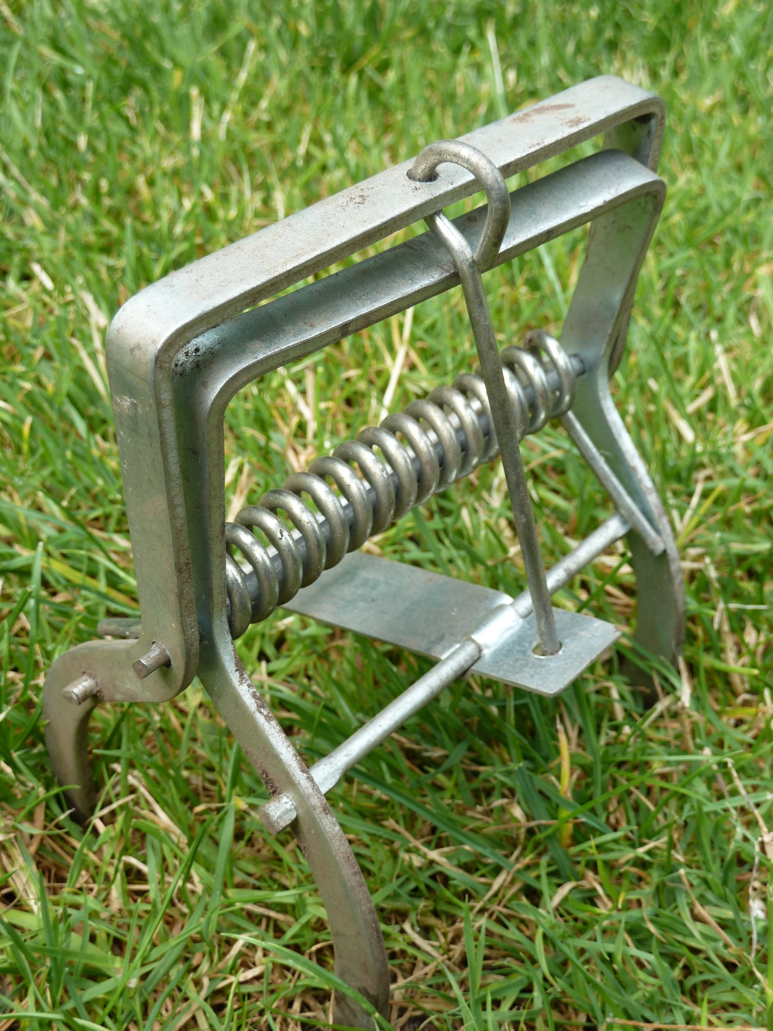 Eine scharf gestellte Maulwurffalle